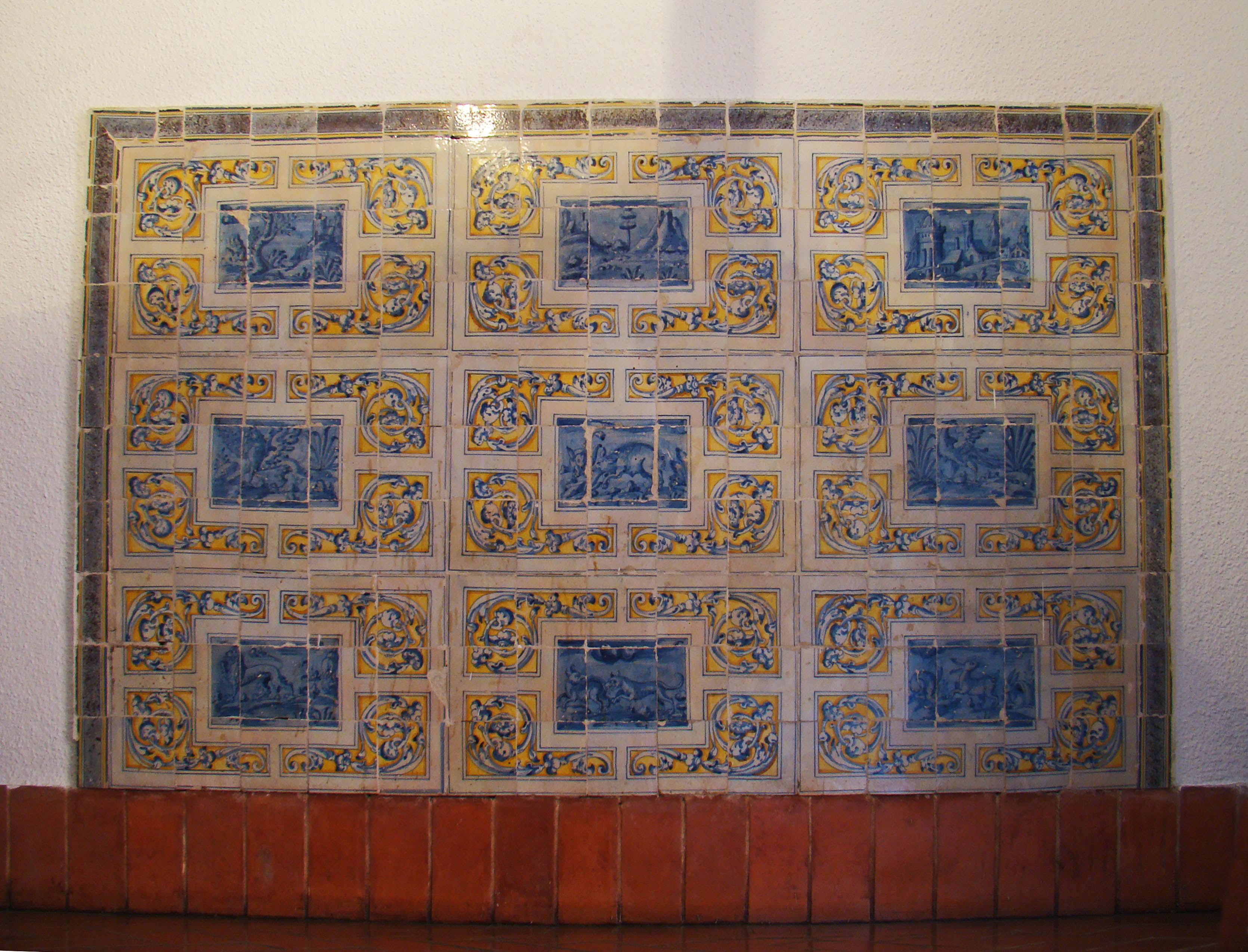 Obra de azulejería de Hernando de Loaysa realizada en el siglo XVI para decoración del palacio del banquero Fabio Nelli de Valladolid (España).